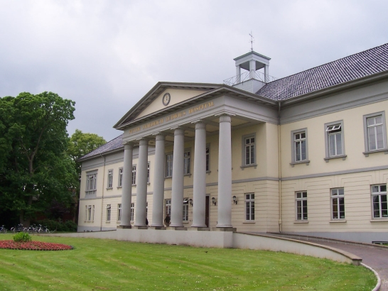 Peter Friedrich Ludwig Hospital